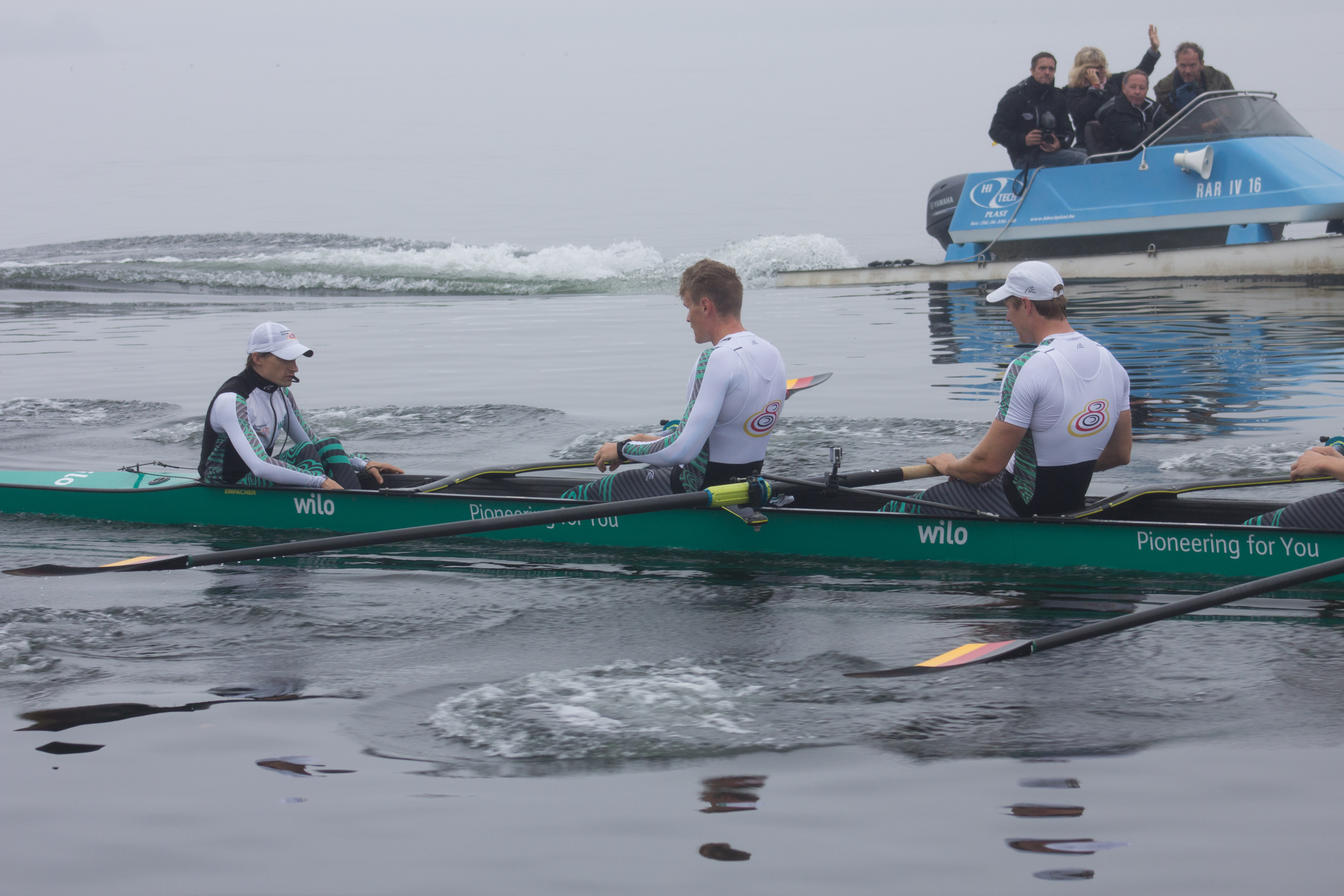 Medientag des Ruderverbandes in der Ruderakademie Ratzeburg am 6. September 2017: Deutschland-Achter im Training auf dem Ratzeburger See in der Besetzung: Johannes Weißenfeld, Felix Wimberger, Maximilian Planer, Torben Johannesen, Jakob Schneider, Malte Jakschik, Richard Schmidt, Hannes Ocik, Martin Sauer